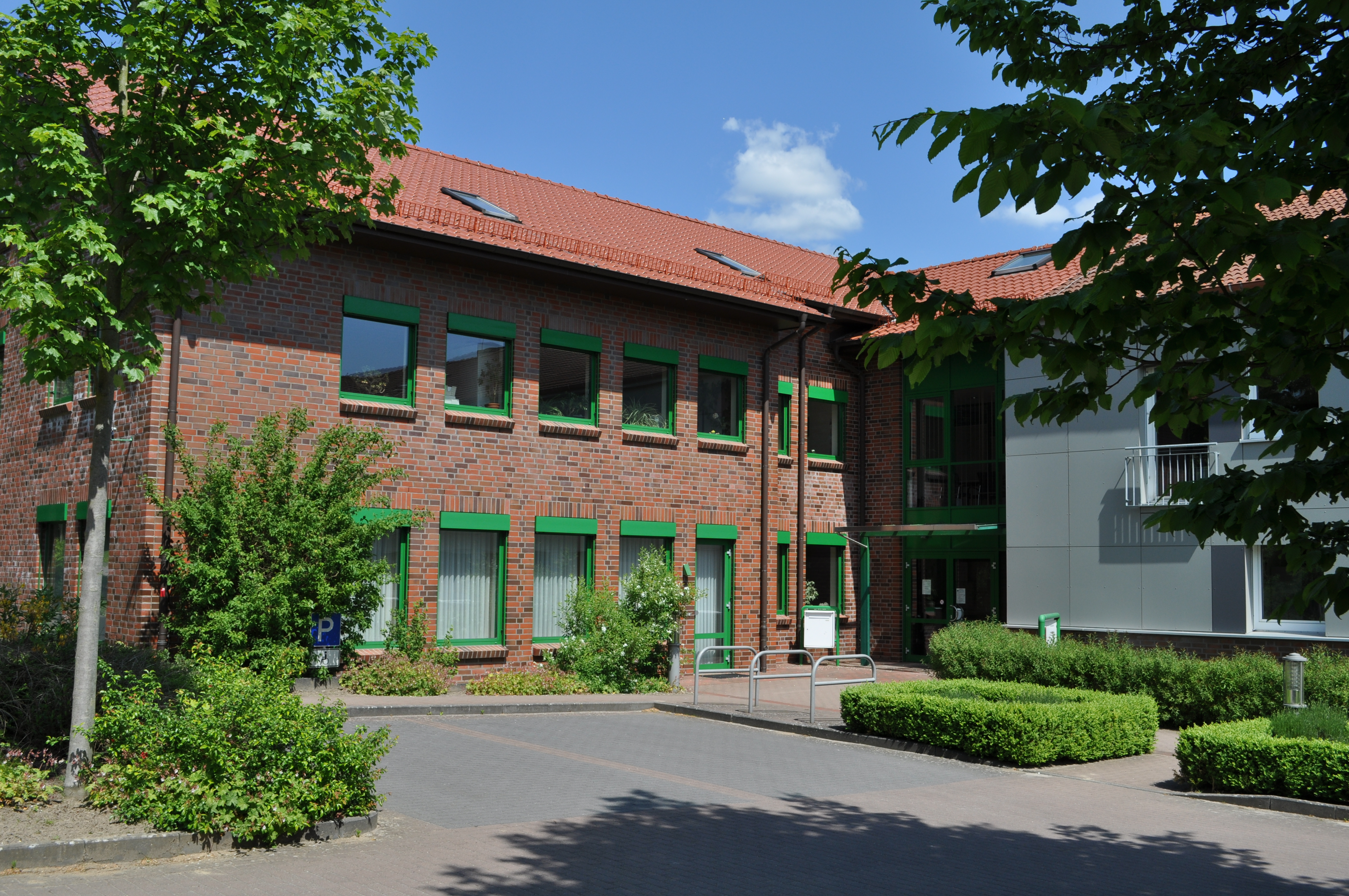 Amtsverwaltung Itzstedt.